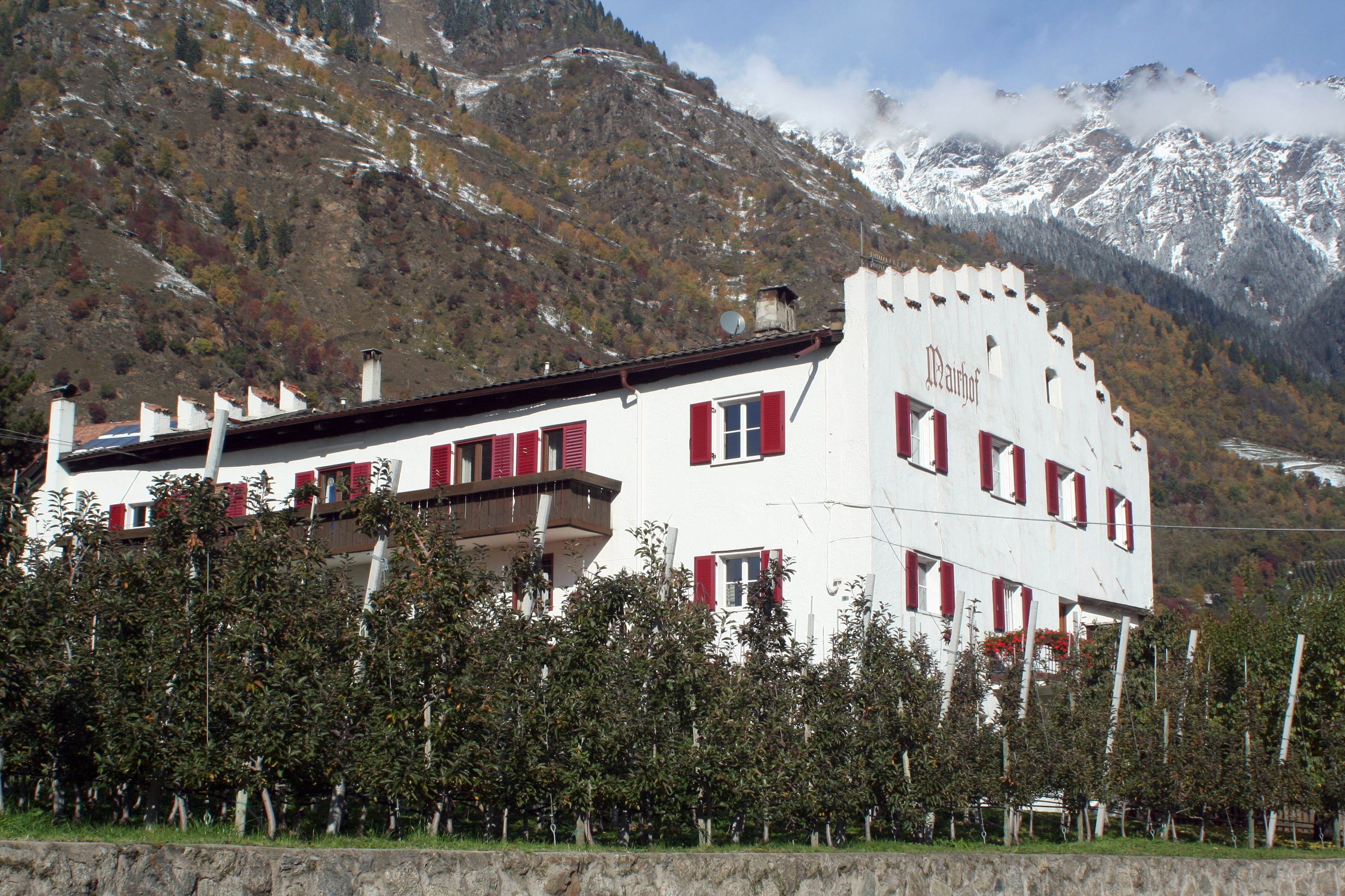 Mairhof in Partschins (Südtirol)